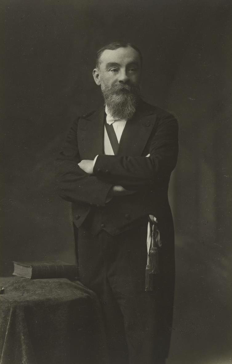 "M. Ferdinand Brunot, Maire du XIVe arrondissement, Doyen de la Faculté de Lettres, Commandeur de la Légion d'honneur, nommé maire-honoraire le 25 juillet 1919".